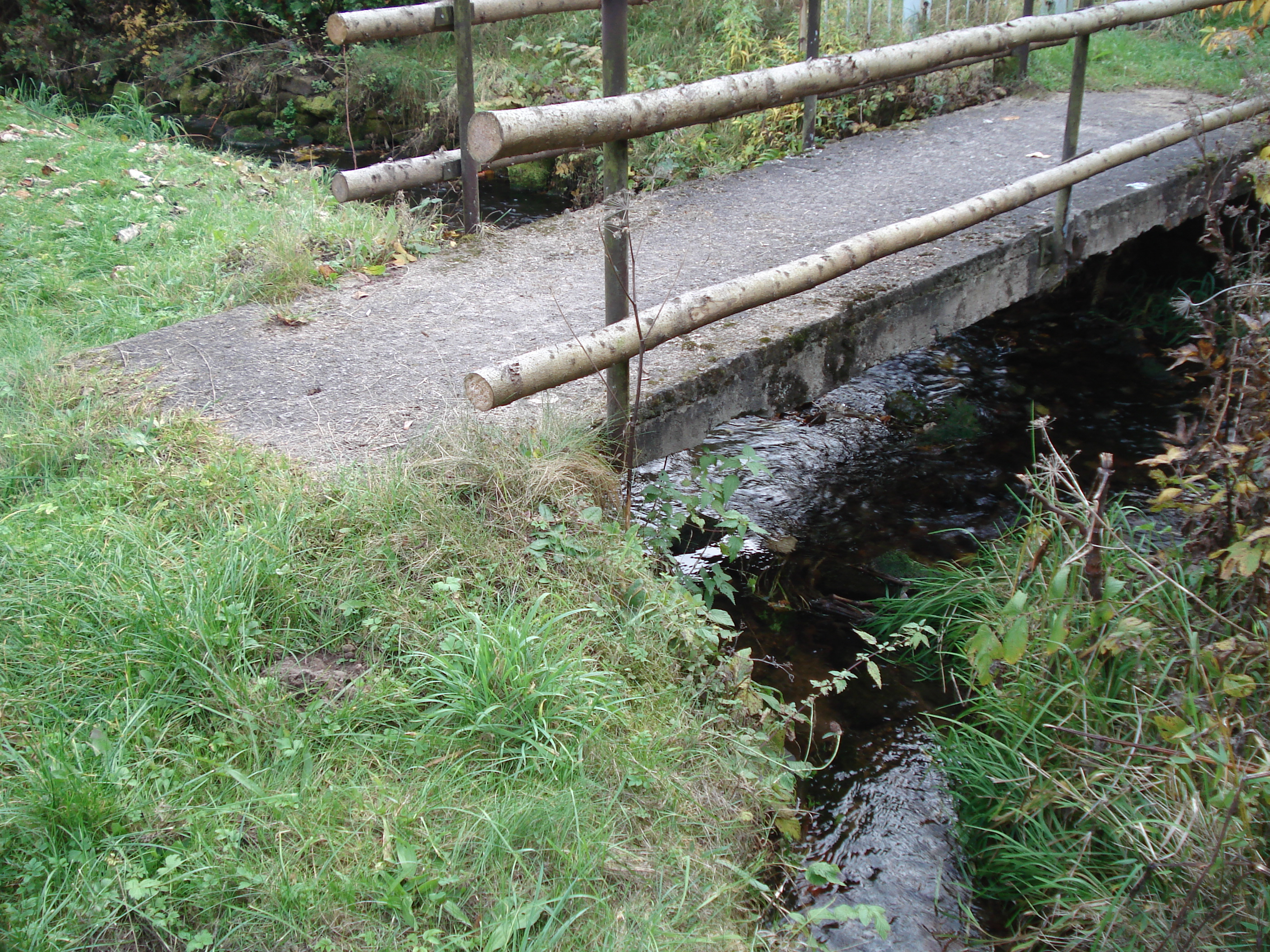 Der Kurze Lohrbach (vorne) mündet in den Lohrbach